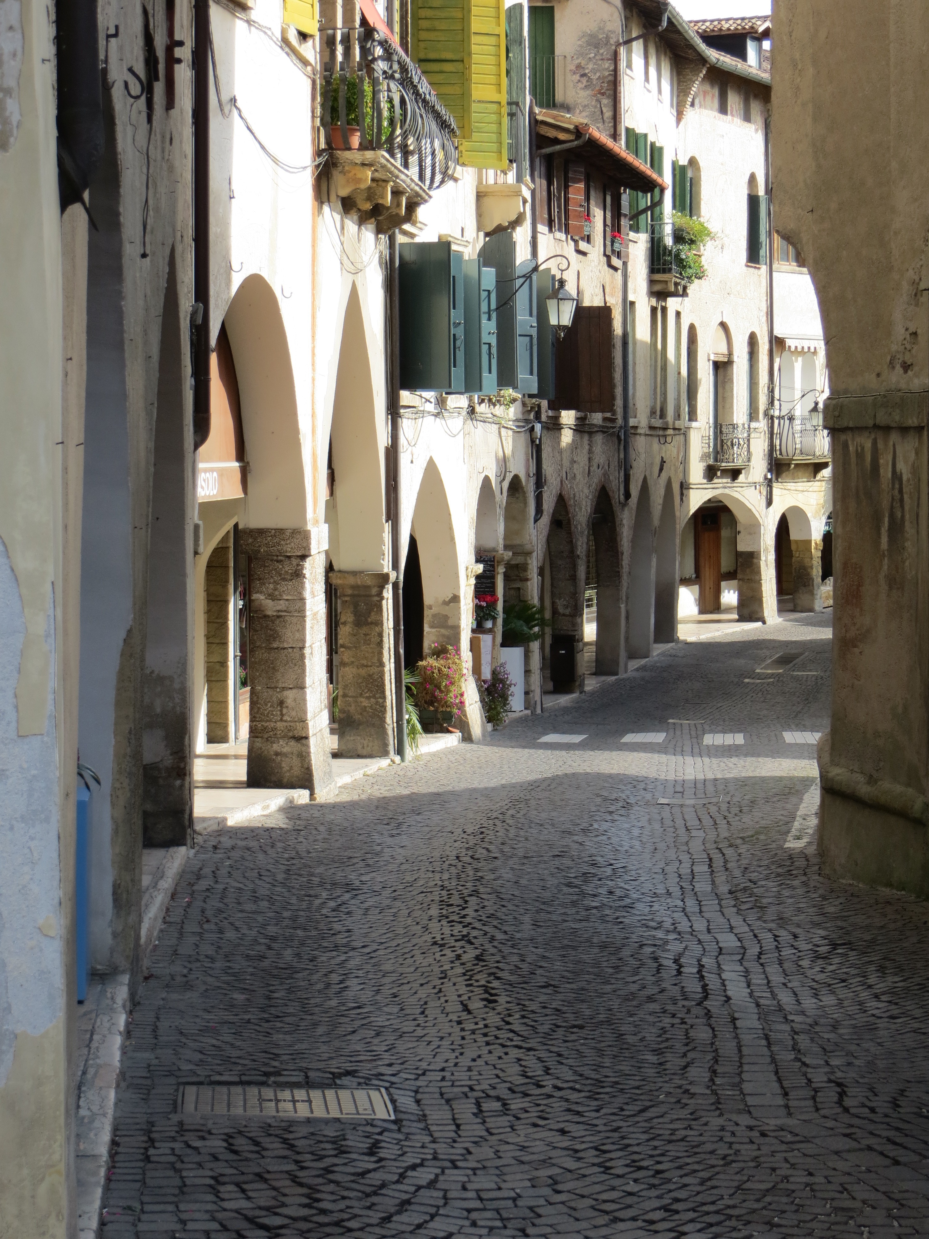 Asolo - Portici di via R. Browning